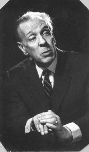 Jorge Luis Borges, 1967. Fotografía de Annemarie Heinrich, blanco y negro sobre papel fotográfico brillante. Retrato en primer plano de Jorge Luis Borges de medio cuerpo, tres cuartos perfil derecho y con ambas manos sobre el mango del bastón. Viste traje y corbata.